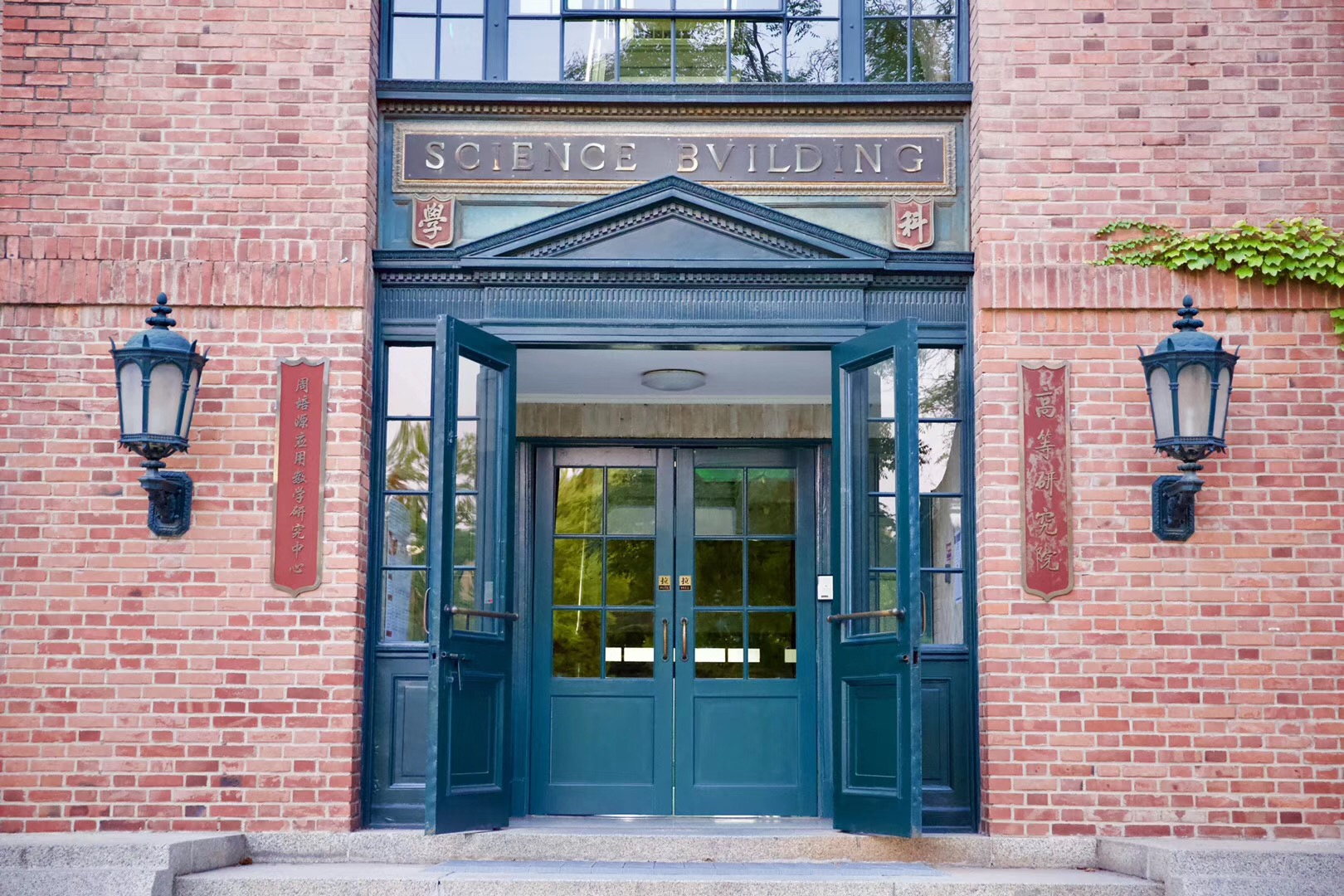 清華大學科學館大門